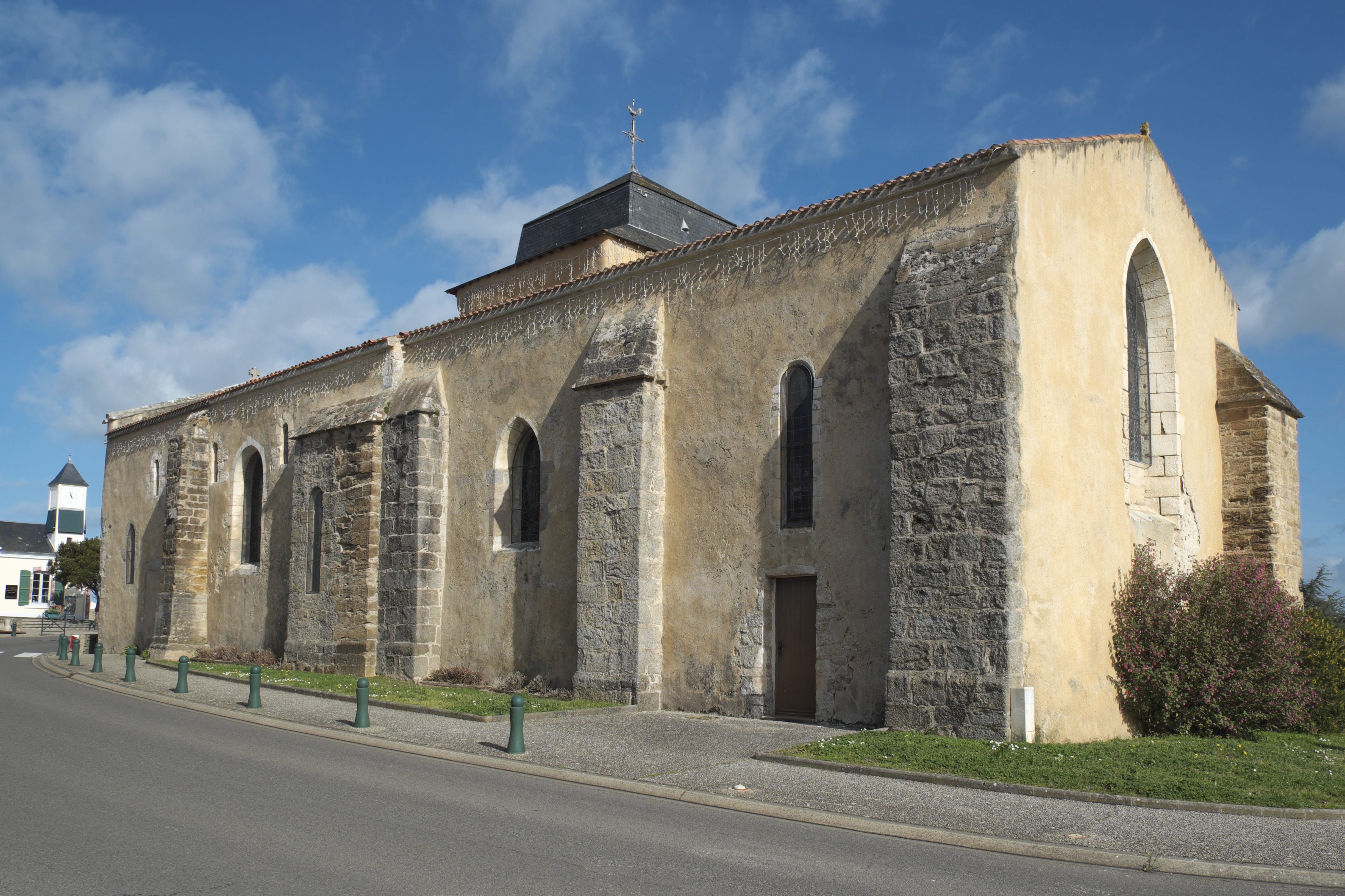 Katholische Pfarrkirche Saint-Vincent in Saint-Vincent-sur-Jard im Département Vendée (Pays de la Loire/Frankreich)